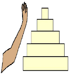 Glifo o escudo del municipio de Zacualtipán de Ángeles